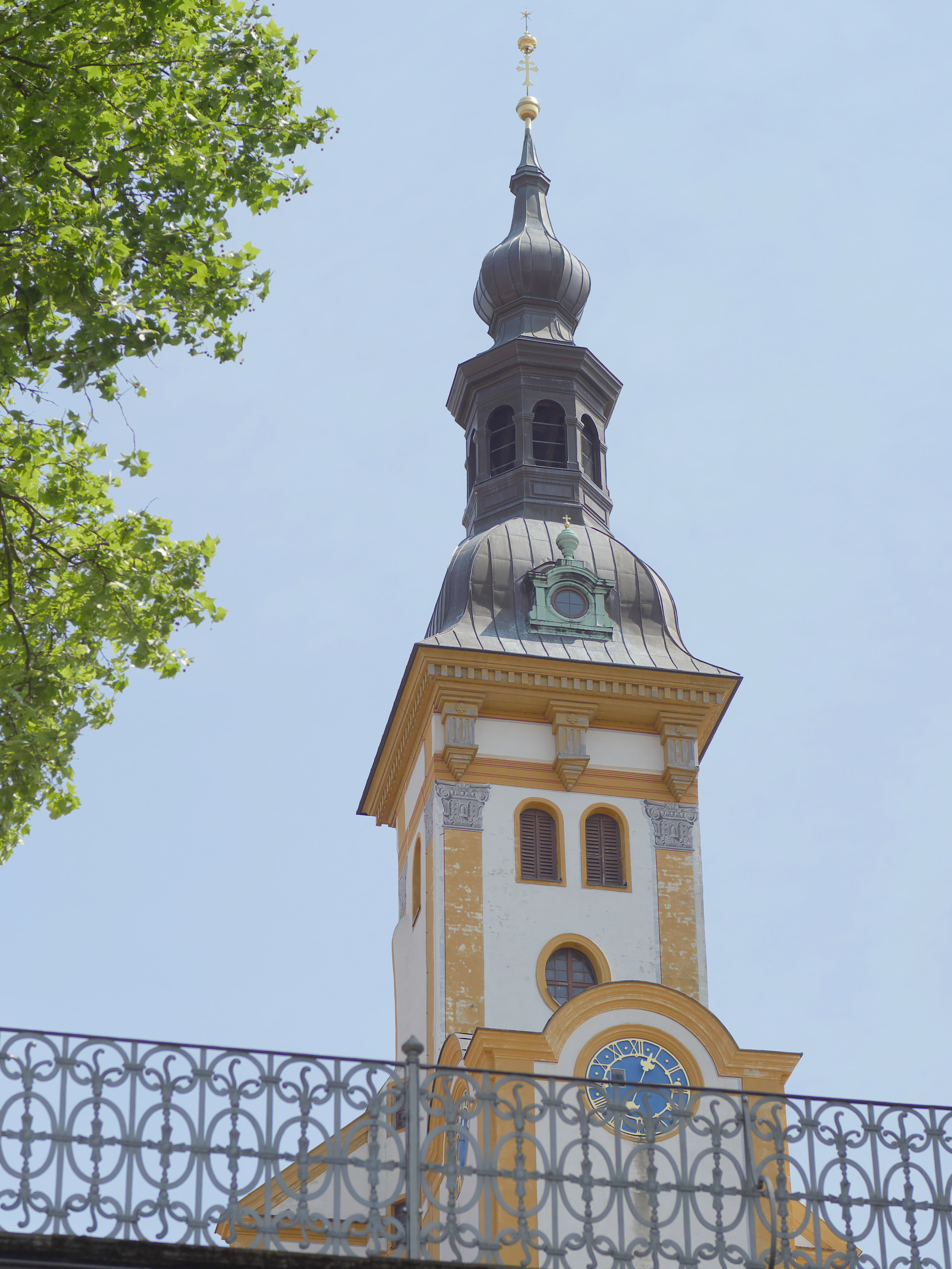 Der Kirchturm der Kirche Sankt Marien des Klosters Neuzelle